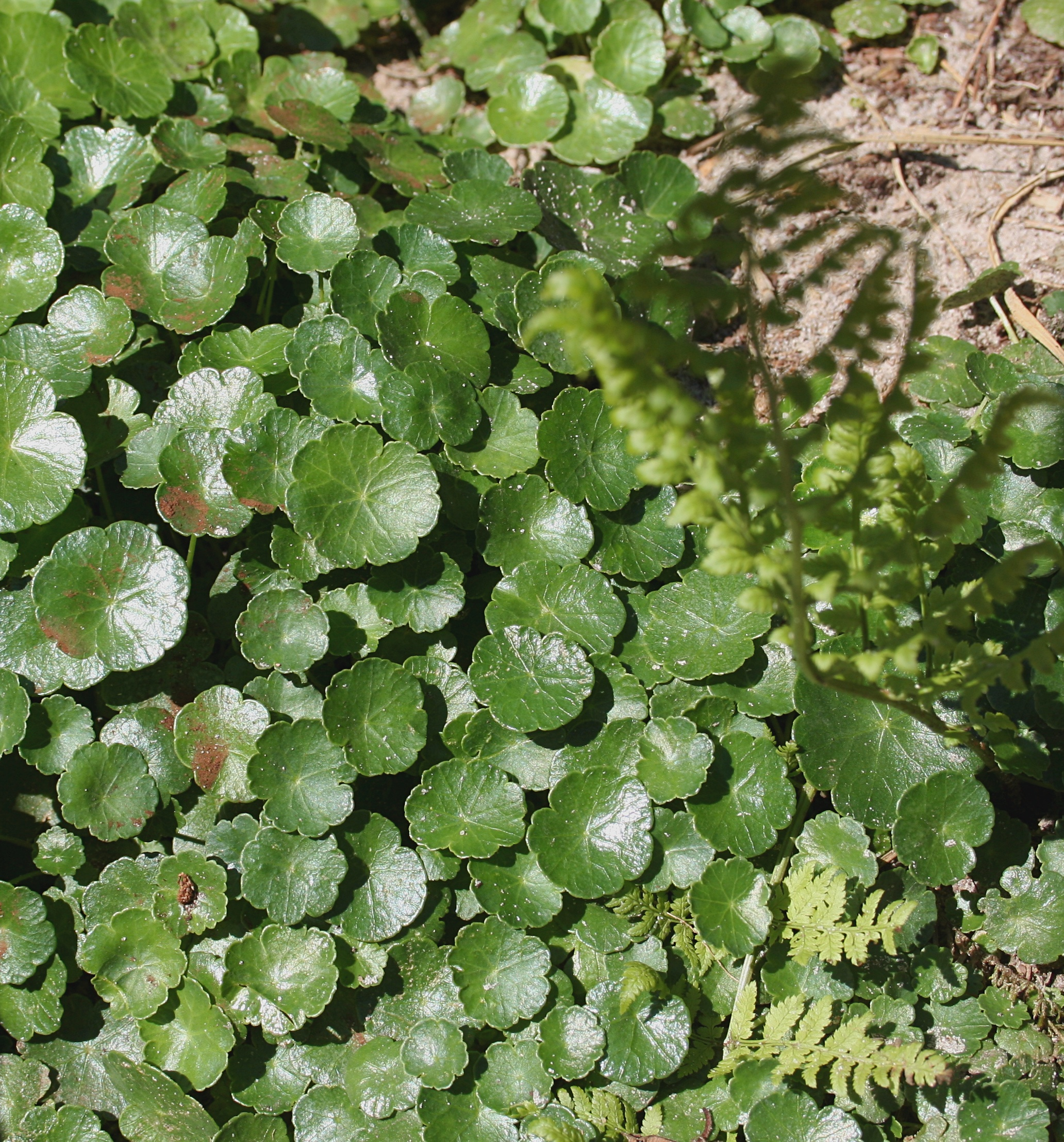 Hydrocorte vulgaris przy pomoście jeziora Radolinek